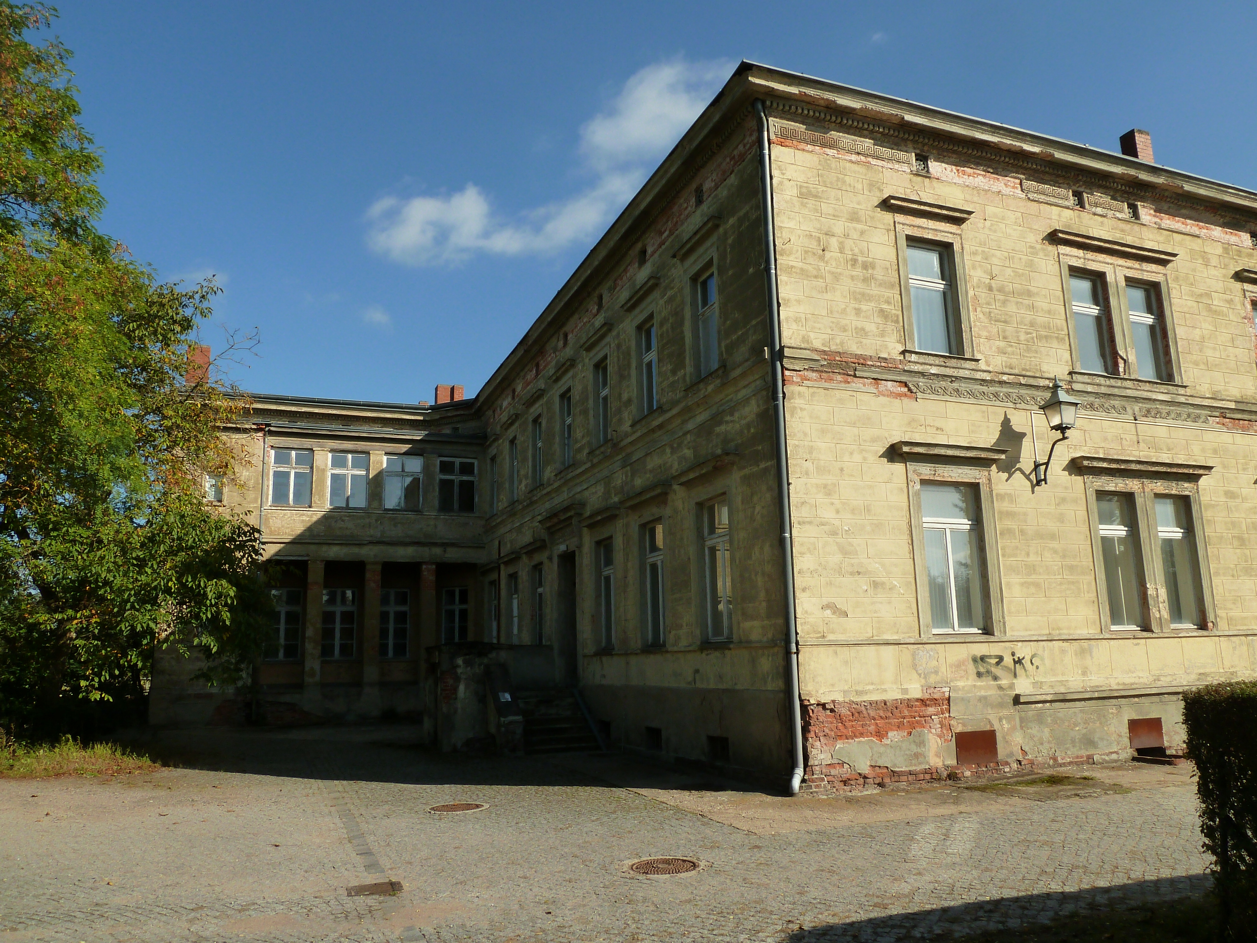 Bahnhof Glöwen (Baudenkmal), Hof